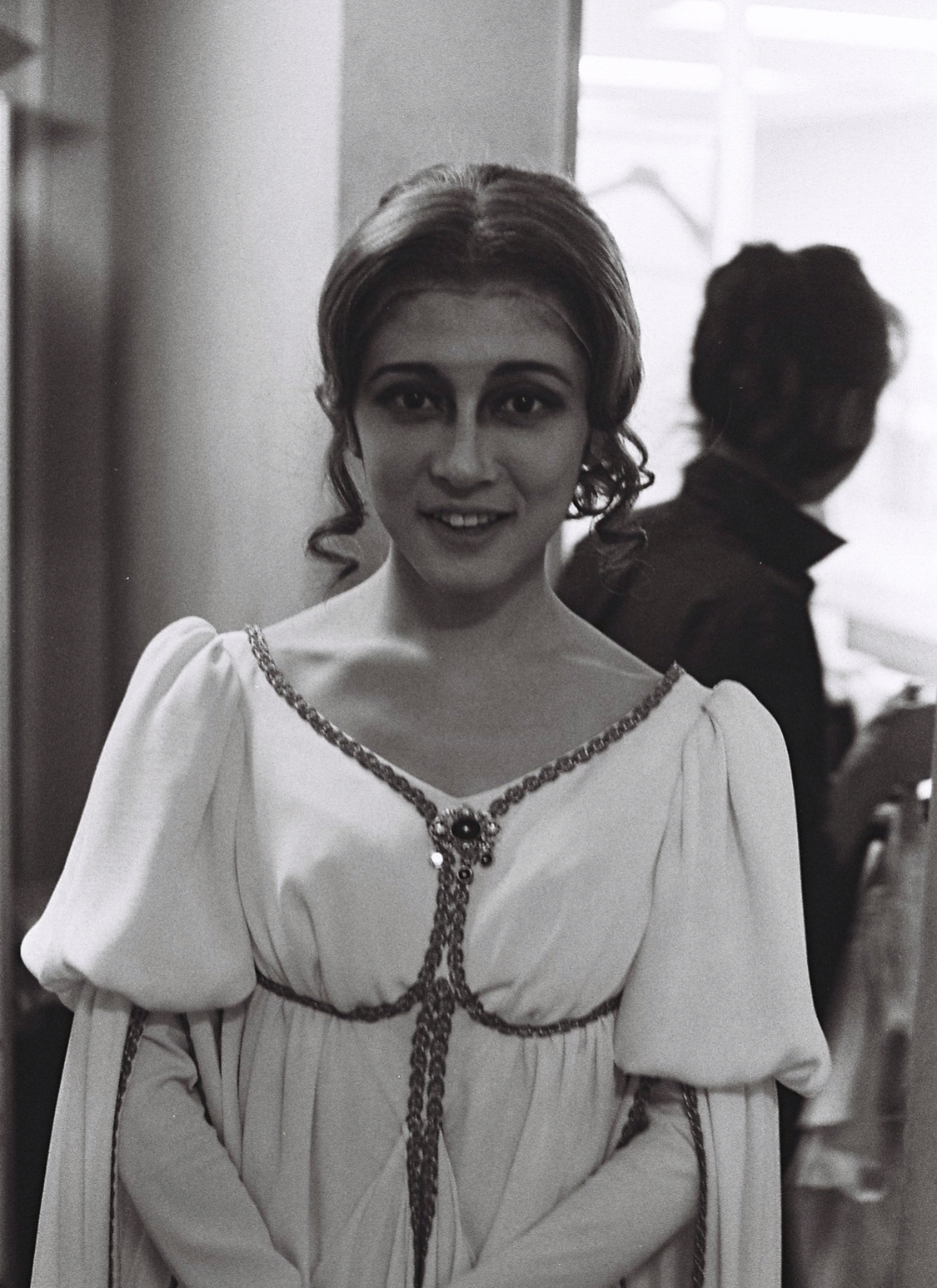 マンドラゴラ毒の華